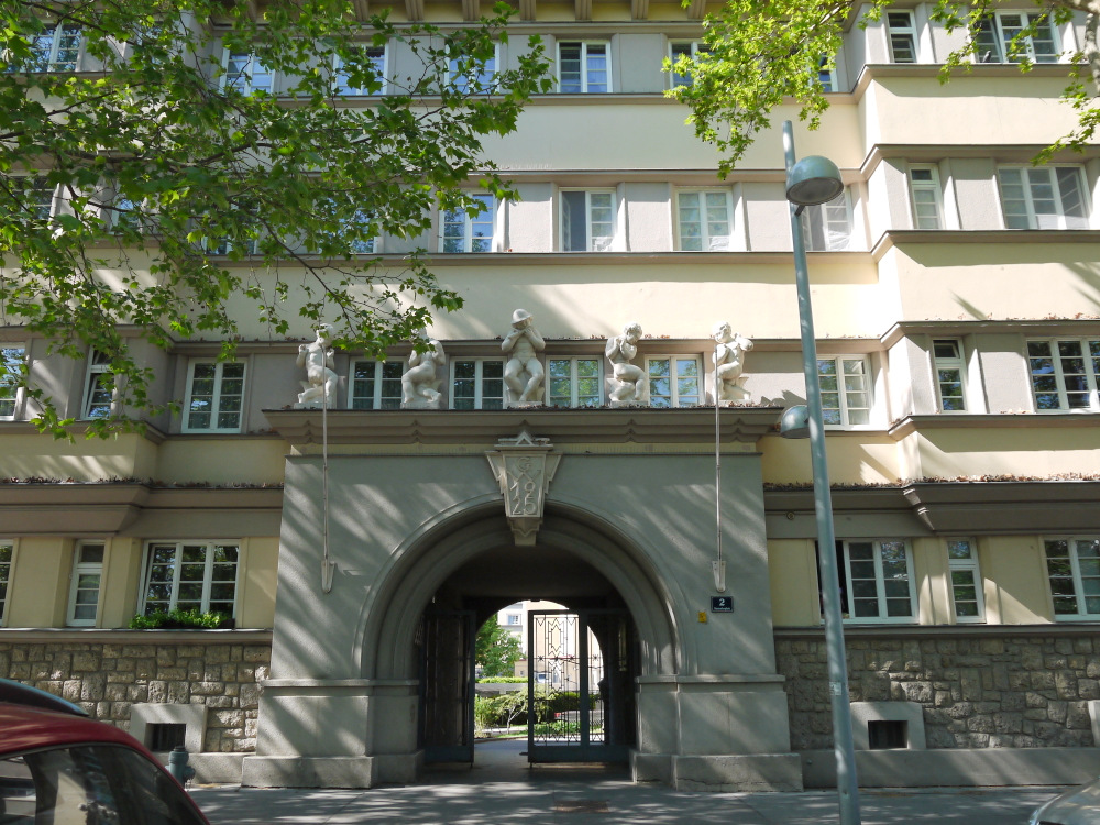 Sandleitenhof